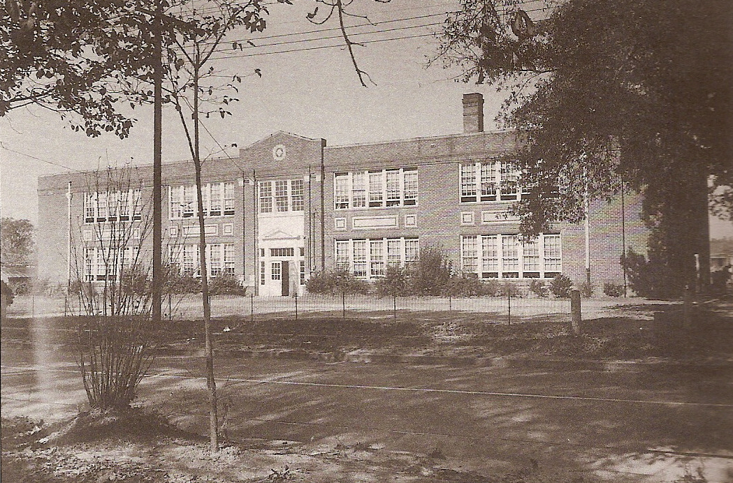 Outterbridge Grammar School